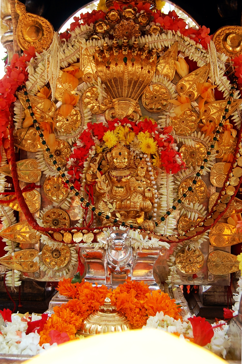 ಕನ್ನಡ: ಶ್ರೀ ಭವಾನಿ ಶಂಕರ